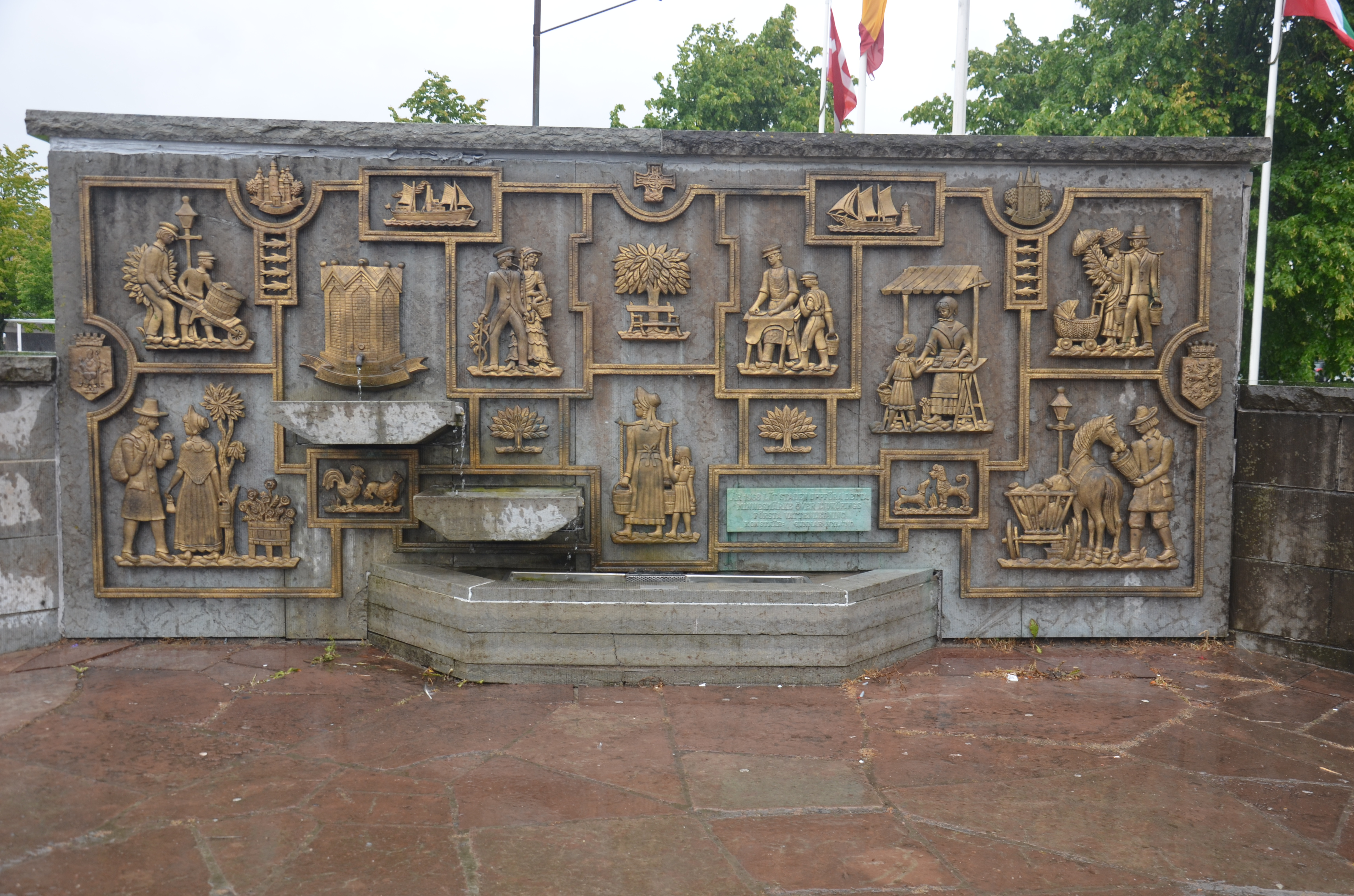 Gunnar Nylund's Särnmarkska pumpen, 1998, Lidlöping , Sweden